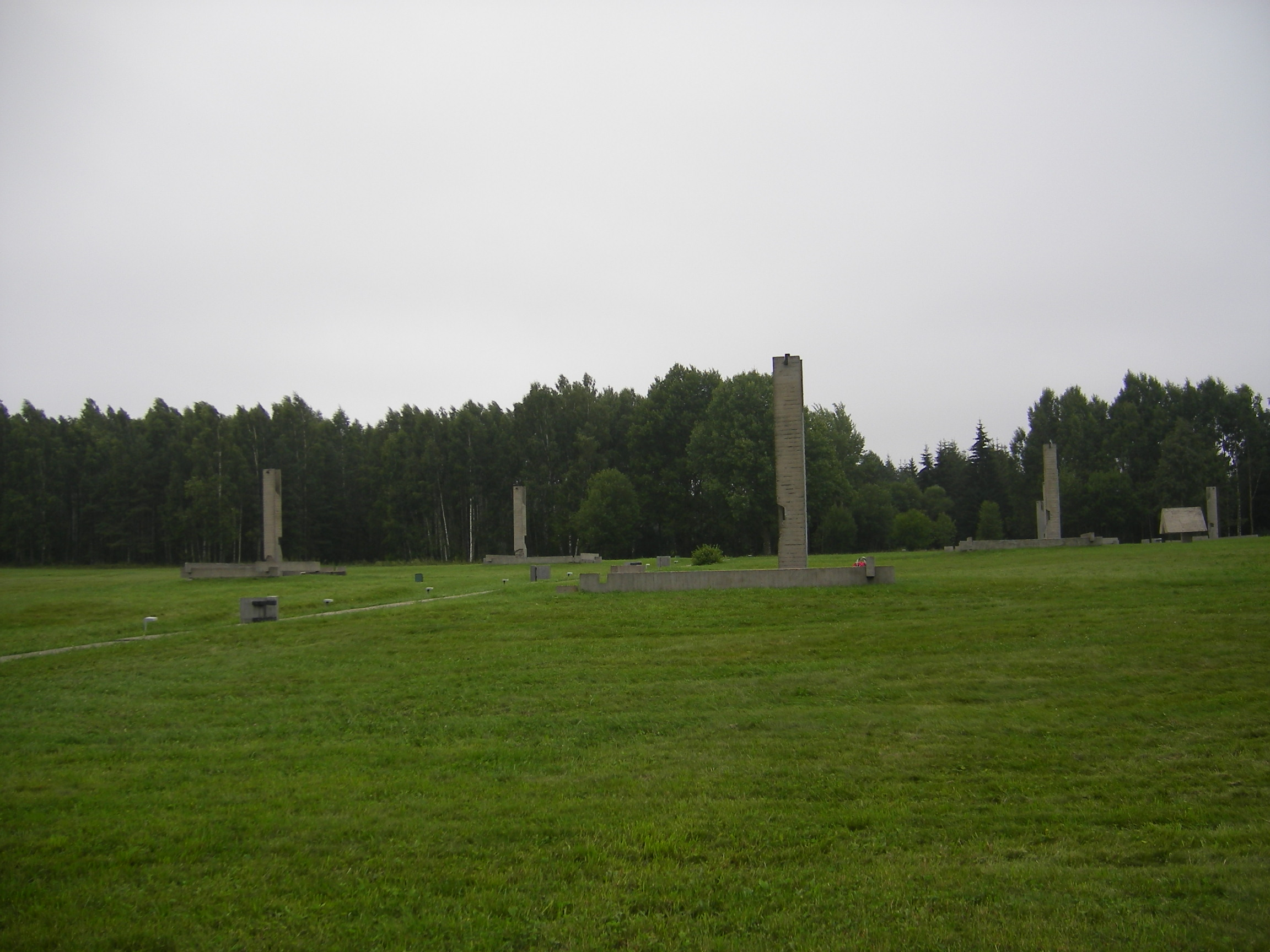 Hatinyi emlékműkomplexum, Belarusz.